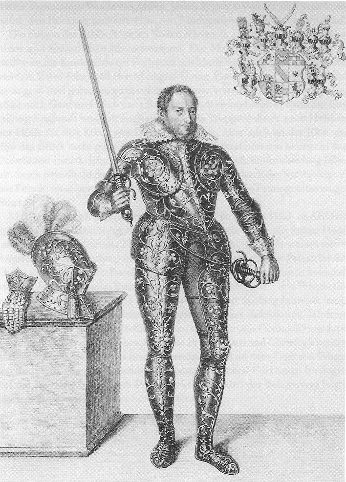 Motiv: Markgraf Georg Friedrich von Baden